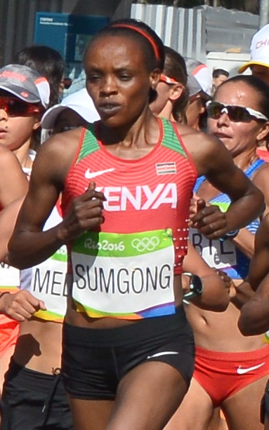 Jemima Jelagat Sumgong championne olympique du marathon de Rio 2016